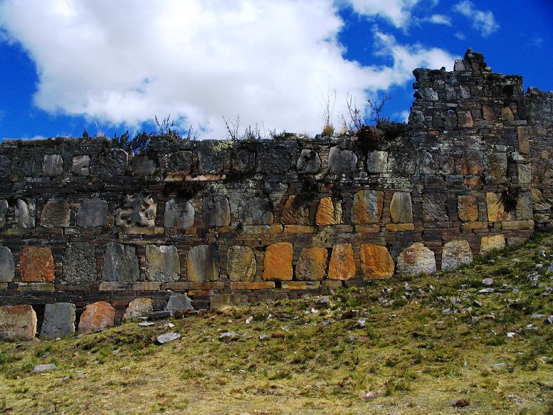 Recinto mayor del claustro, nótese la belleza arquitectónica de los muros.